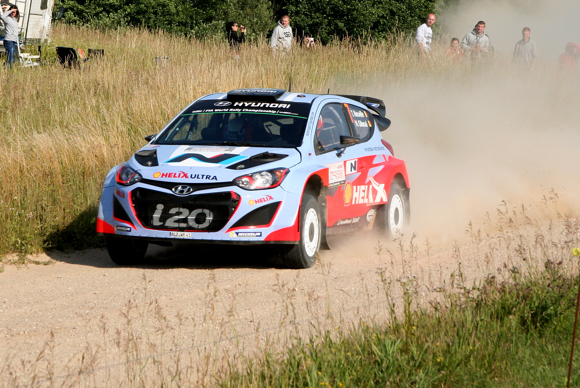 Thierry Neuville podczas Rajdu Polski 2014, 11 OS Chmielówka 1